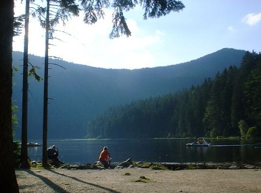 Großer Arbersee im Bayerischen Wald, Foto: Acf 2002, Public Domain